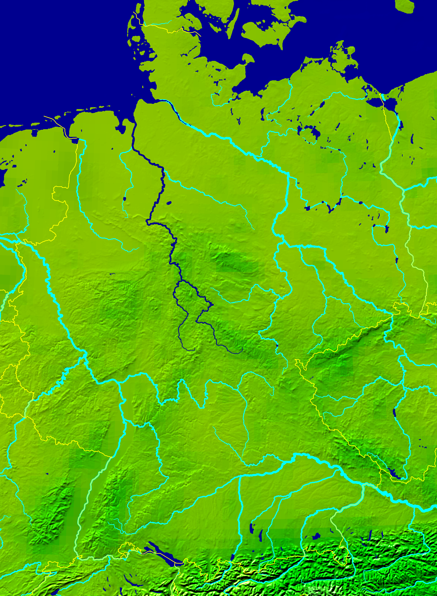 River Weser in Germany